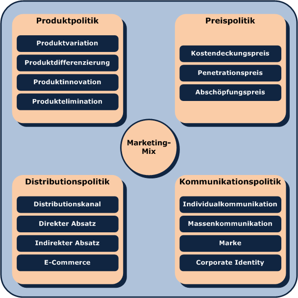 Klassischer Marketing-Mix Franzika eines Unternehmens mit den 4 Marketinginstrumenten Produktpolitik, Preispolitik, Distributionspolitik und Kommunikationspolitik.